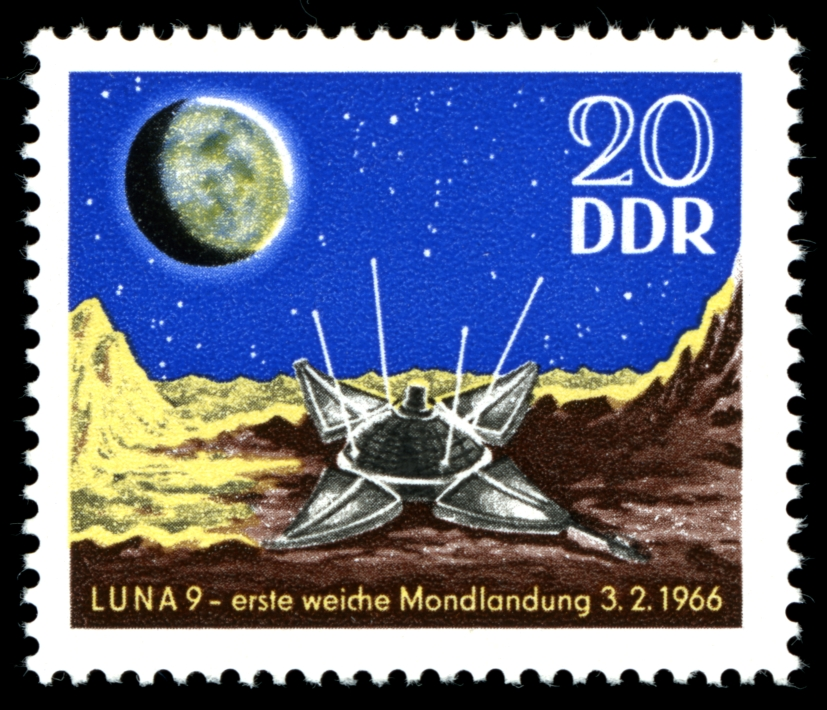 Information: Erste weiche Mondlandung durch Luna 9 Ausgabepreis: 20 Pfennig First Day of Issue / Erstausgabetag: 7. März 1966 Auflage: 4.000.000 Entwurf: Pochanke und Stauf Druckverfahren: Rastertiefdruck Michel-Katalog-Nr: Ländercode-MiNr: 1168